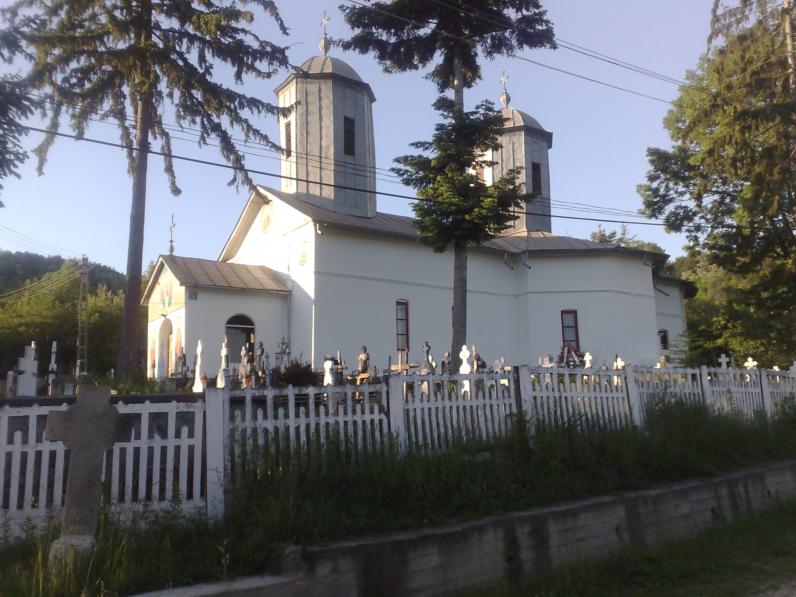 Biserica Cucuteni Dâmbovița